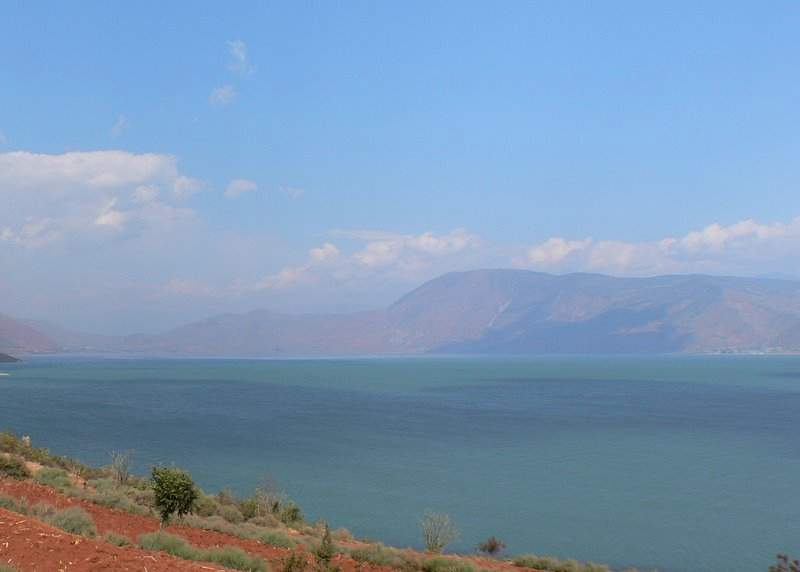 云南省丽江市永胜县程海湖